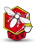 logo svazu